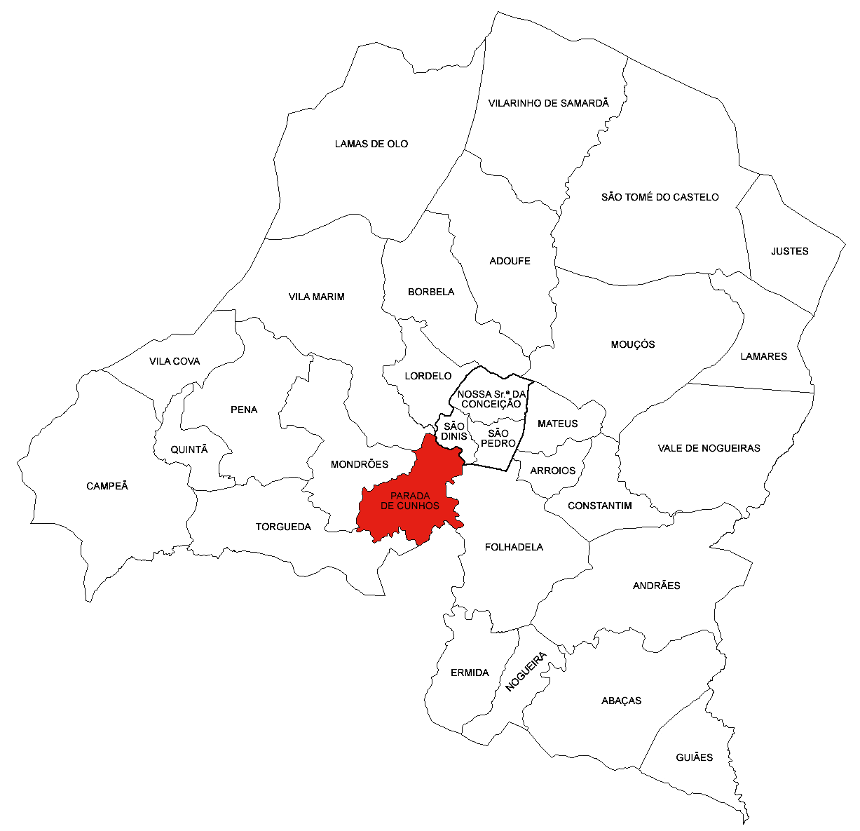 Freguesia de Parada de Cunhos (concelho de Vila Real)